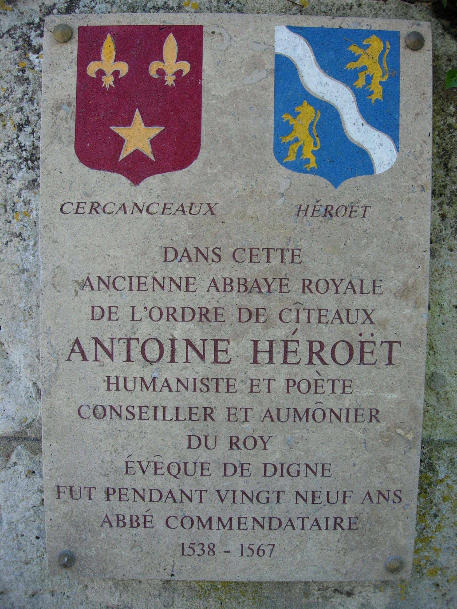 Plaque relative à Antoine Héroët apposée à l'entrée de l'abbaye de Cercanceaux